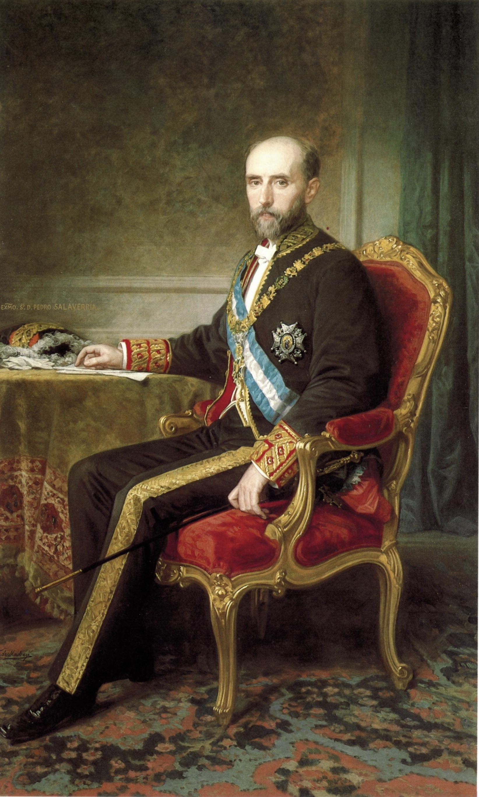 Retrato del hacendista y político español Pedro Salaverría (1821-1896), que fue ministro de Hacienda y de Fomento durante el reinado de Isabel II de España y, posteriormente, ministro de Hacienda durante el reinado de Alfonso XII.